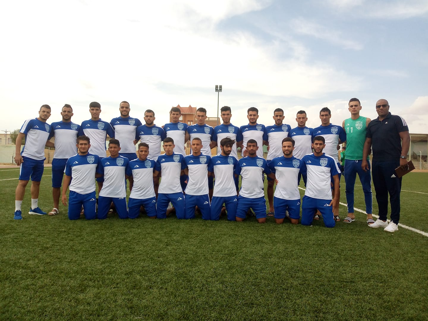 تمثل الصورة لاعبي اتحاد الدوسن